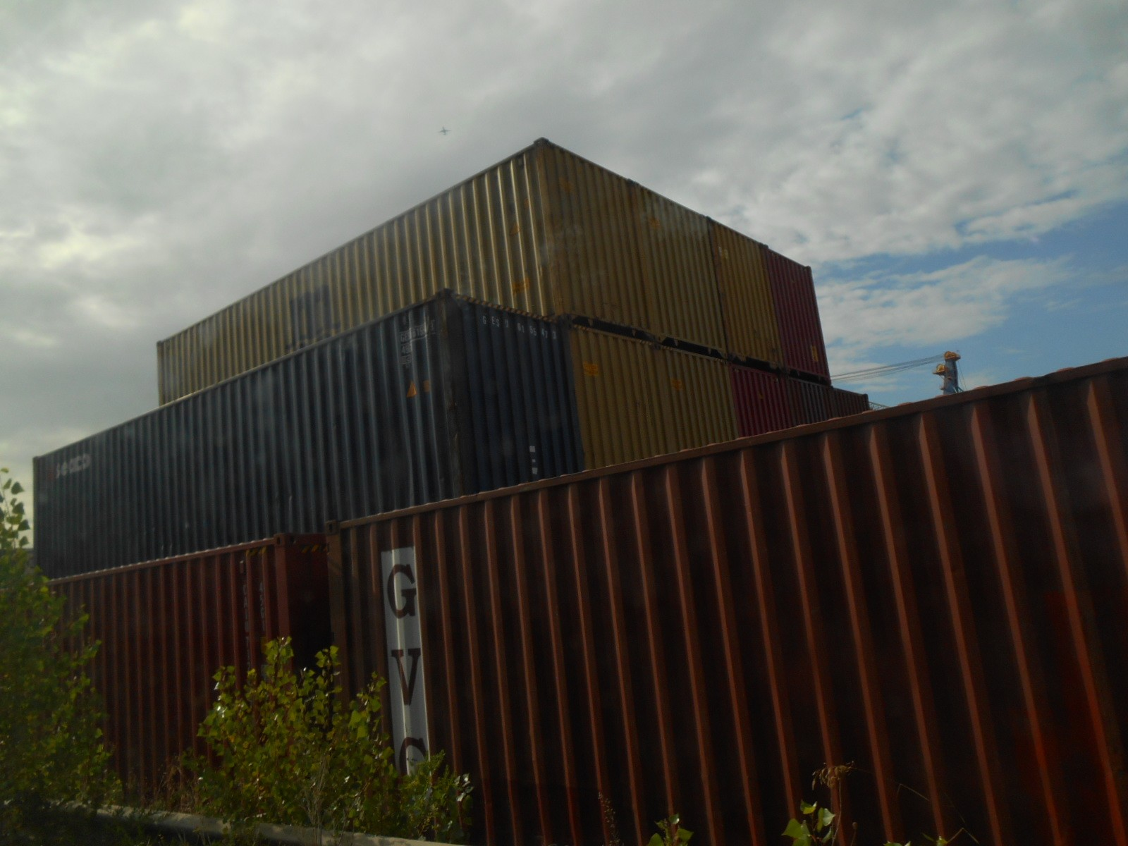 conteneurs